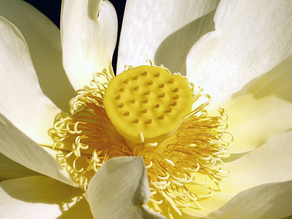 American lotus (Nelumbo lutea)